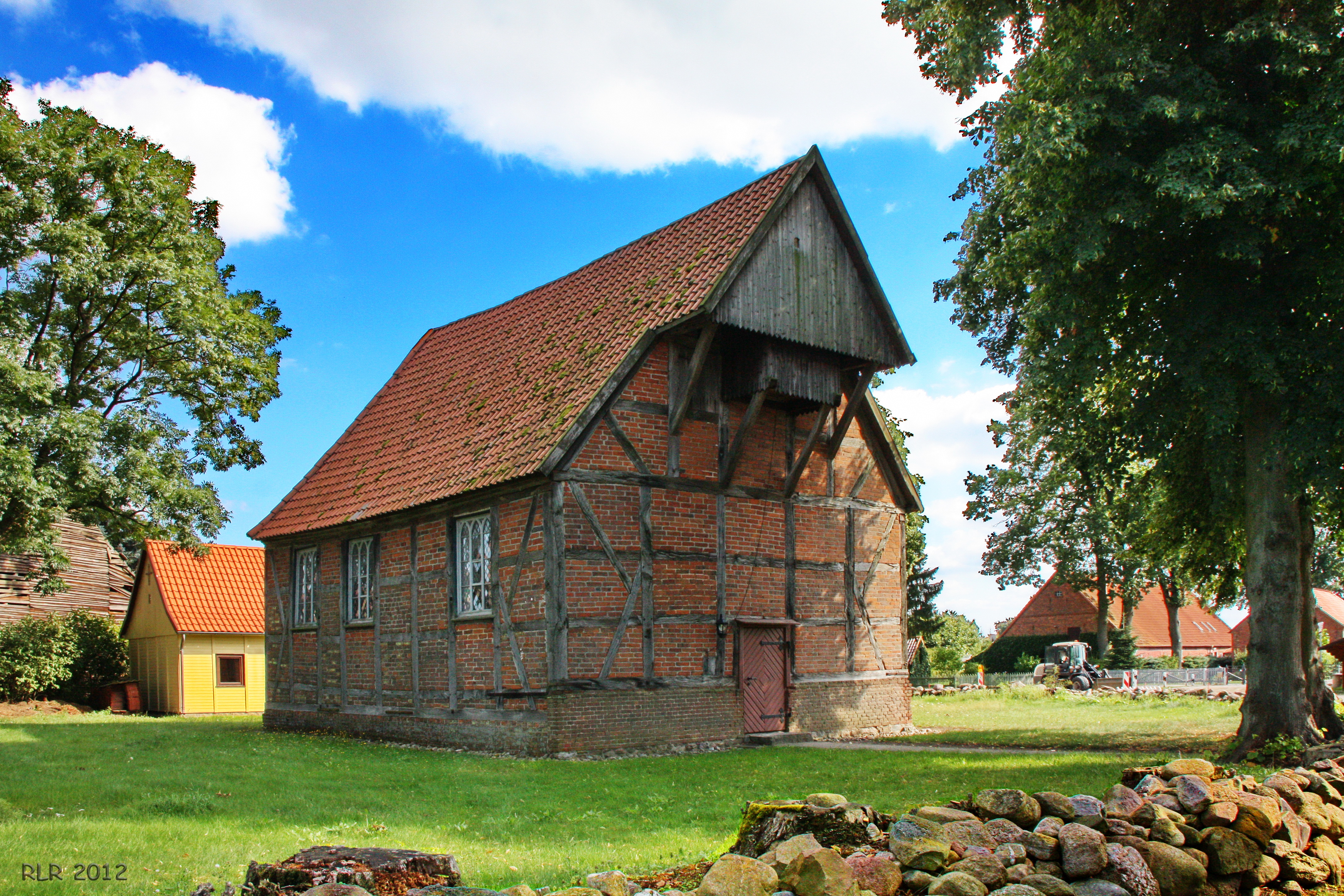 Dorfkirche in Karstädt bei Ludwigslust